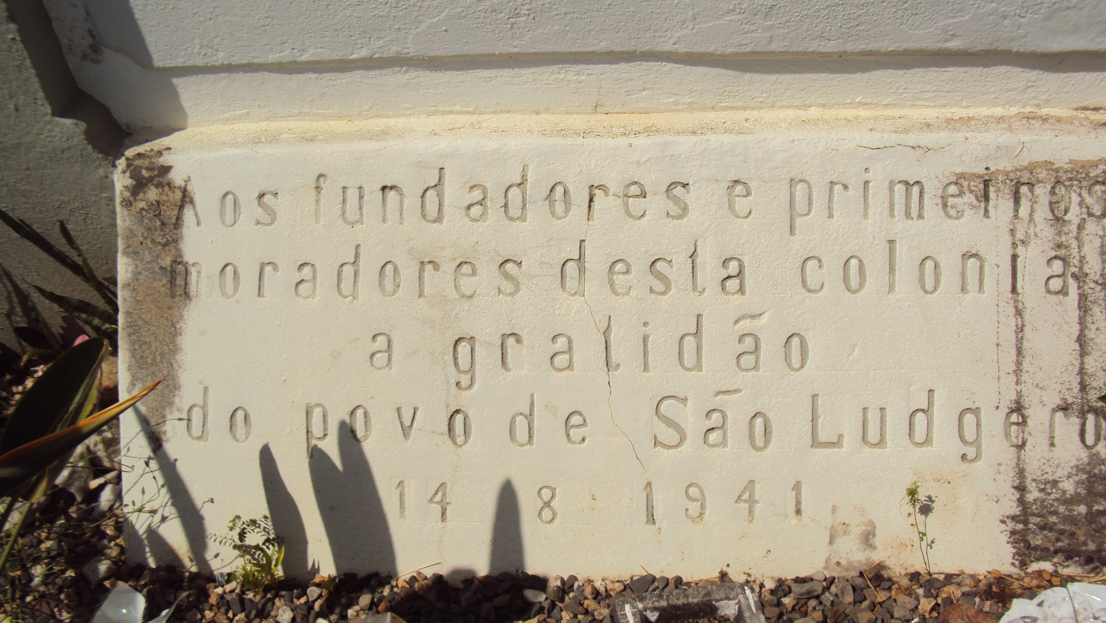 Sepultura coletiva dos imigrantes fundadores da colônia de Braço do Norte